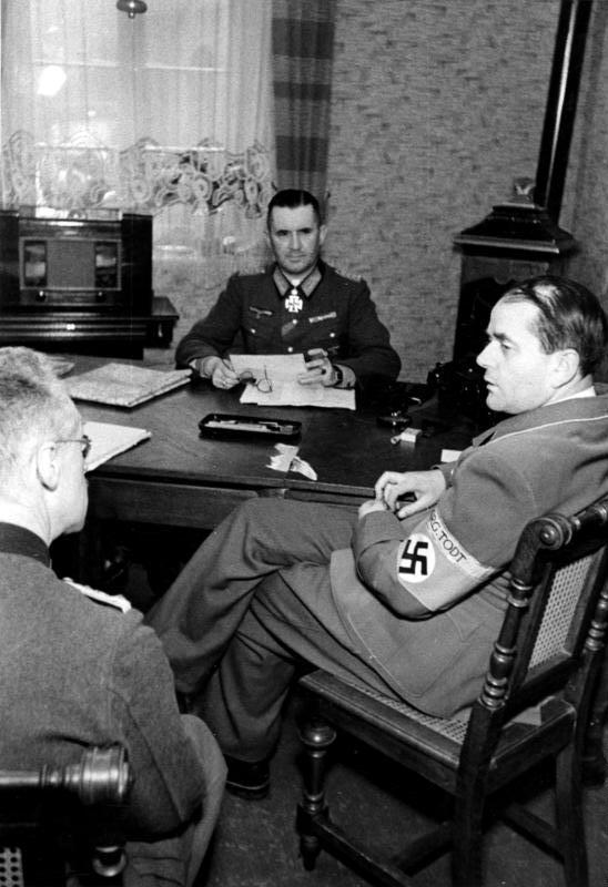 Zentralbild, II. Weltkrieg 1939 - 45 An der Westfront, 1944 Der Reichsminister für Rüstung und Kriegsproduktion Prof. Albert Speer bespricht mit dem Oberbefehlshaber einer Armee, General der Infanterie Gustav von Zangen, Nachschubfragen. H 28 061